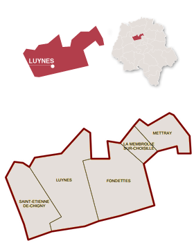 Le Canton de Luynes